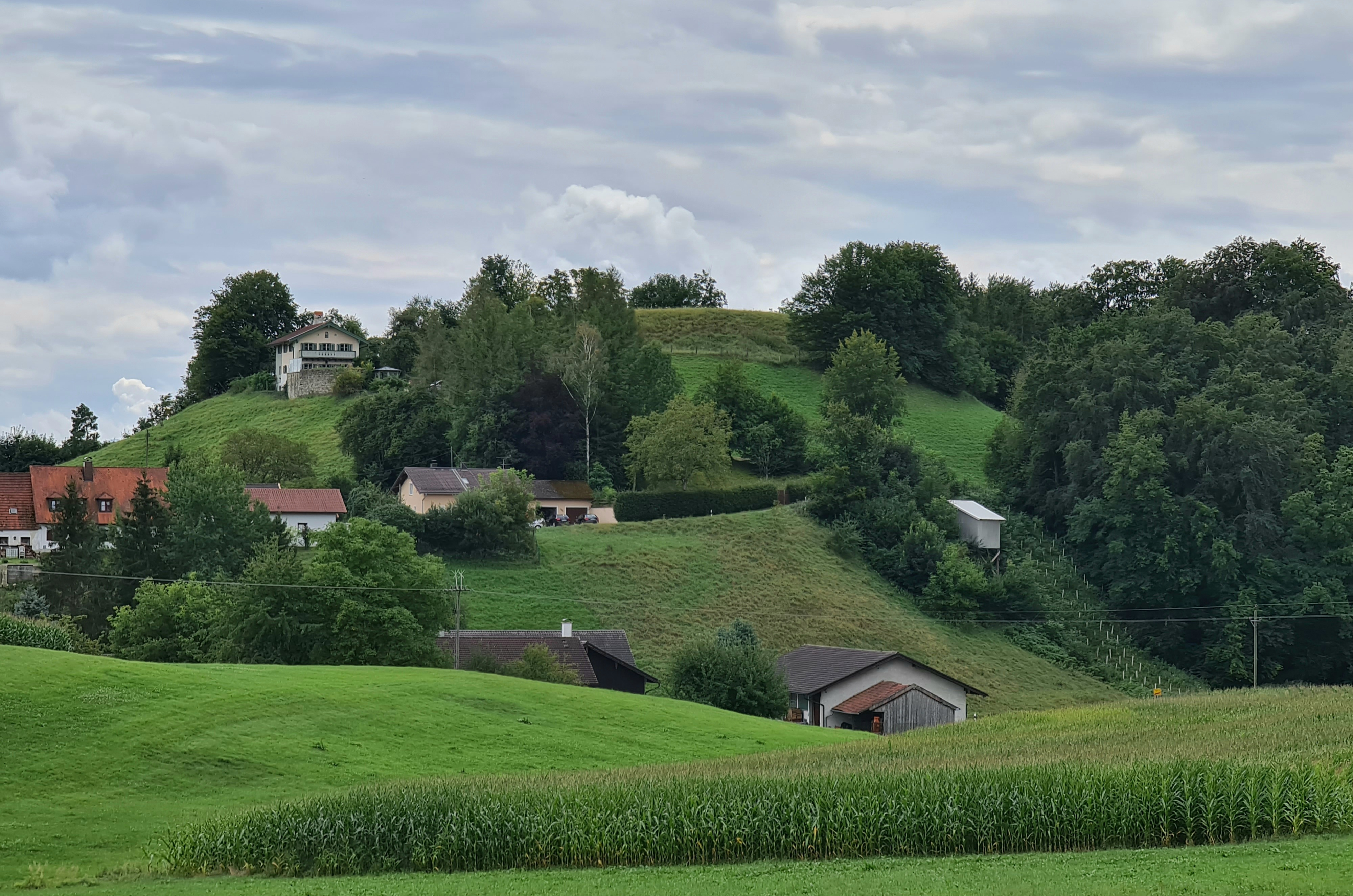 Hohenburg